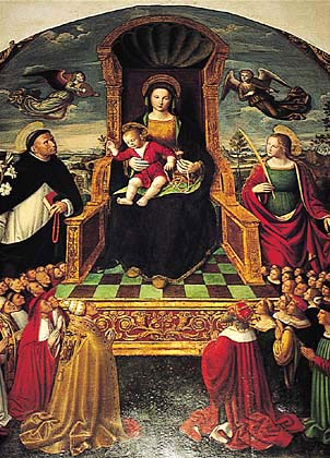 Retable de Notre Dame du Rosaire dans le couvent des Dominicains à Taggia (Italie)